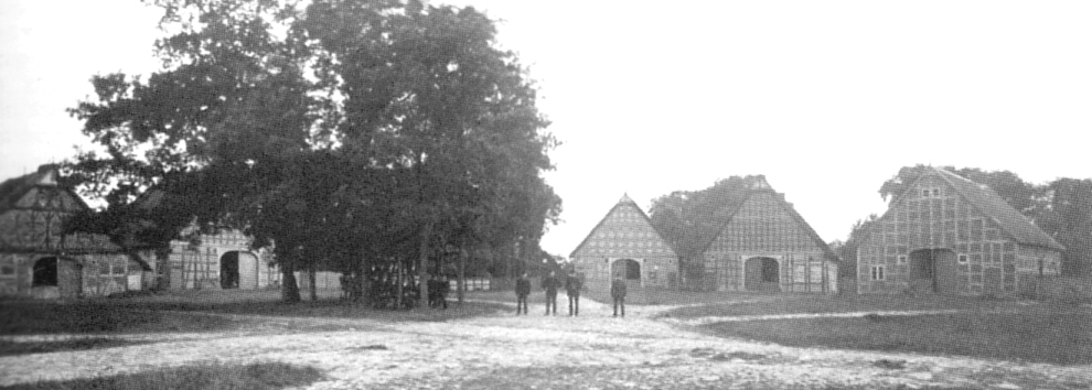 Schreyahn